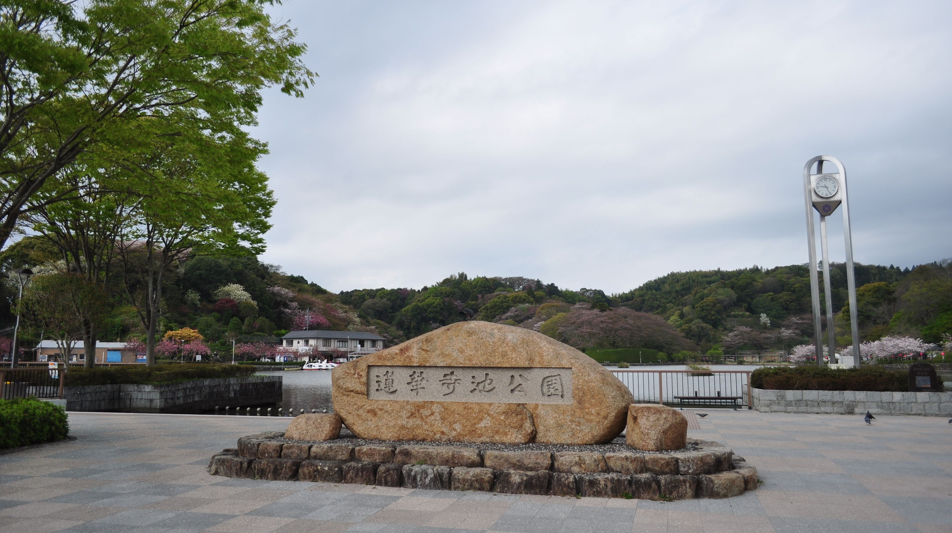 蓮華寺池公園